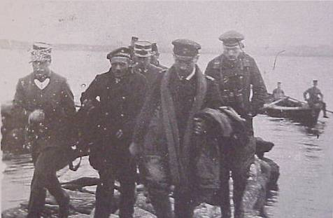 Besætningsmedlemmer fra L 20 efter en svømmetur i Gandsfjorden